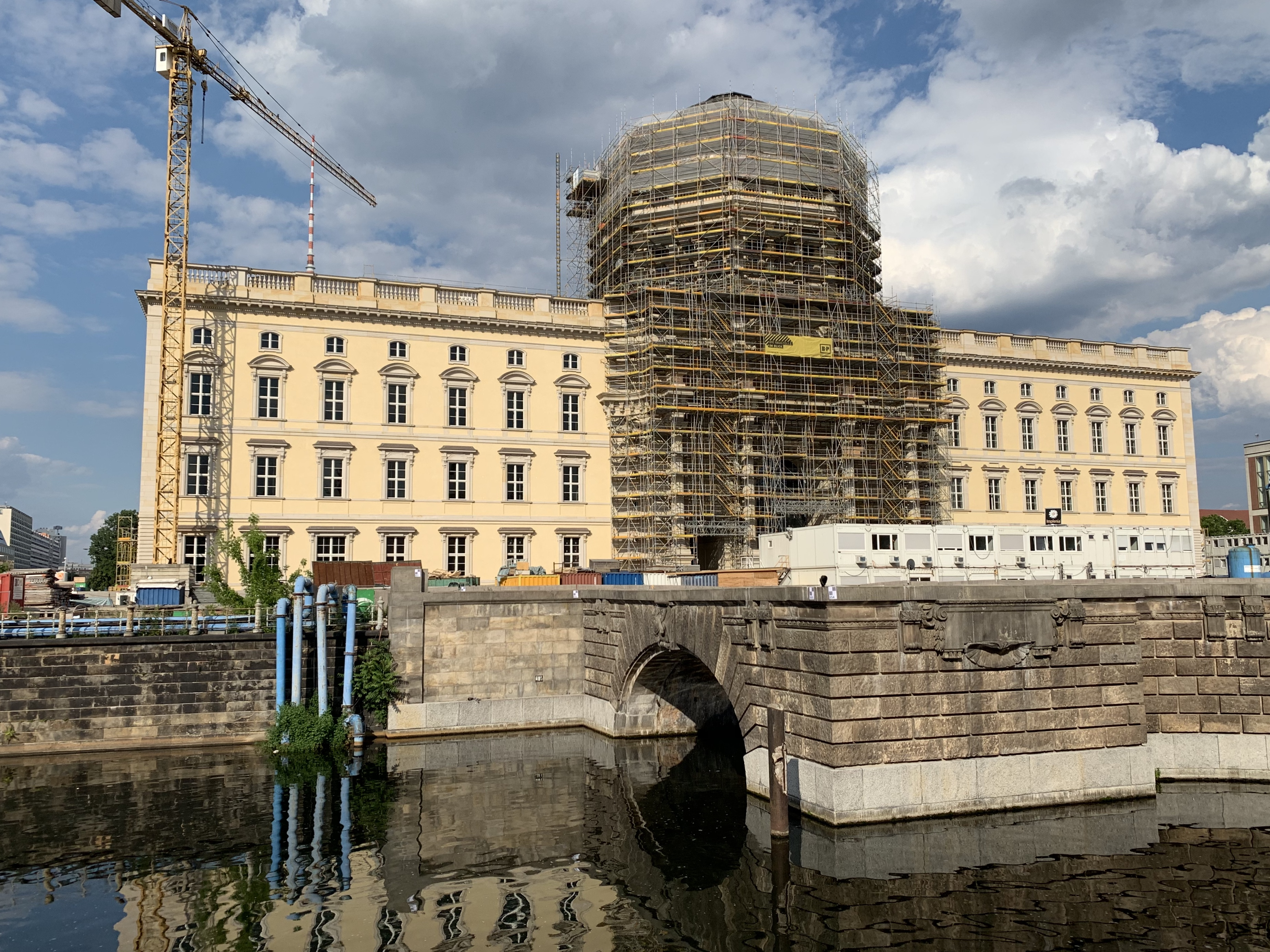 Stan odbudowy w czerwcu 2019